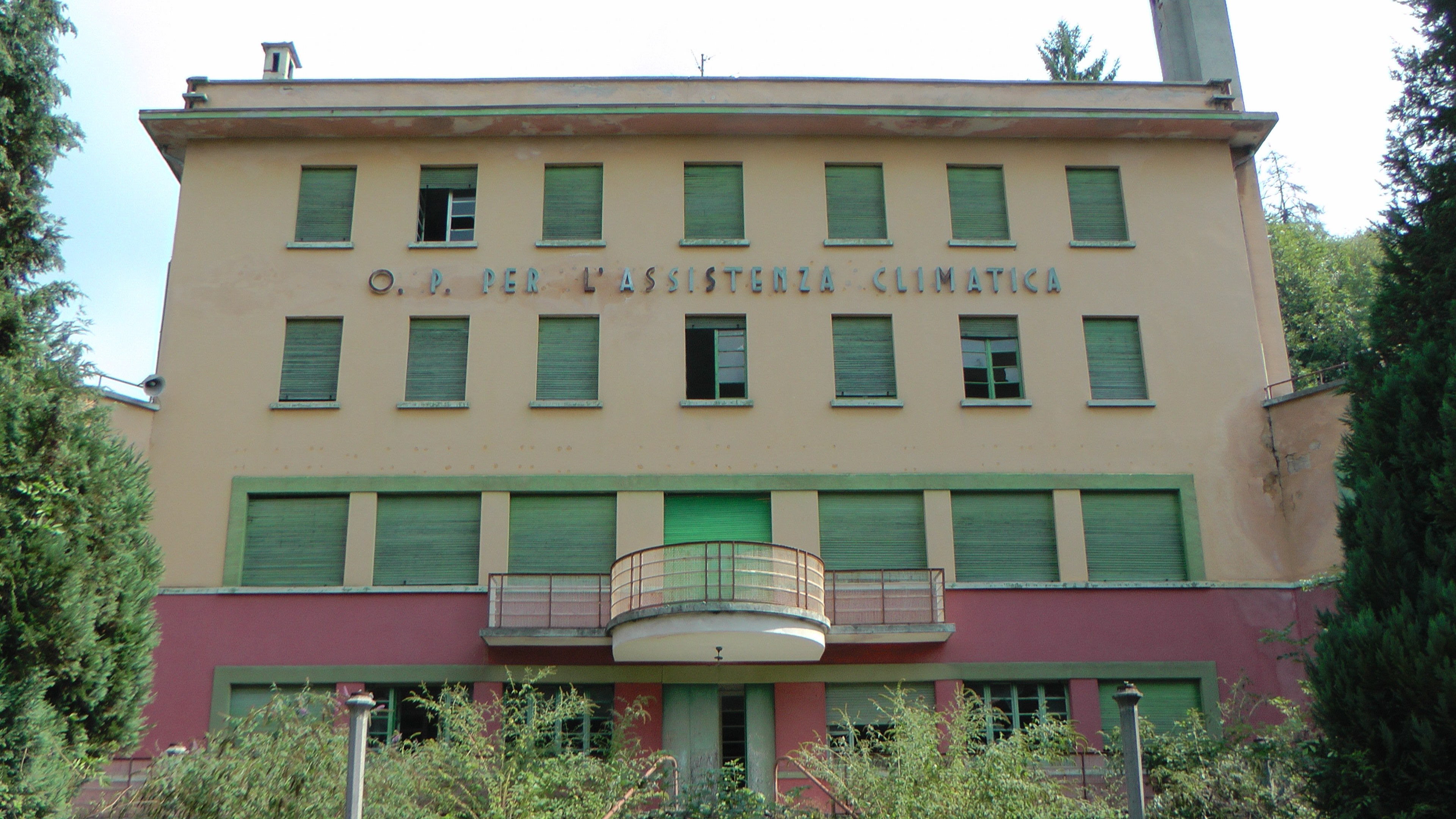 שיזופולי (Sciesopoli) הוא שמו של מתחם בעיירה סלבינו, שלמרגלות האלפים בצפון איטליה, אשר שימש משנת 1939 ועד סוף מלחמת העולם השנייה כמעון קיץ לילדים פשיסטים. לאחר המלחמה הוסב על ידי חיילי הבריגדה היהודית, בראשותו של משה זעירי, ל"בית עליית הנוער". בבית התגוררו בתקופות שונות לאחר המלחמה כ-800 ילדים יהודים משארית הפליטה אשר הגיעו לאיטליה בדרכם לארץ ישראל. ילדים אלה נודעו בשם "ילדי סלבינו". "בית עליית הנוער" פעל בין ספטמבר 1945 לנובמבר 1948.